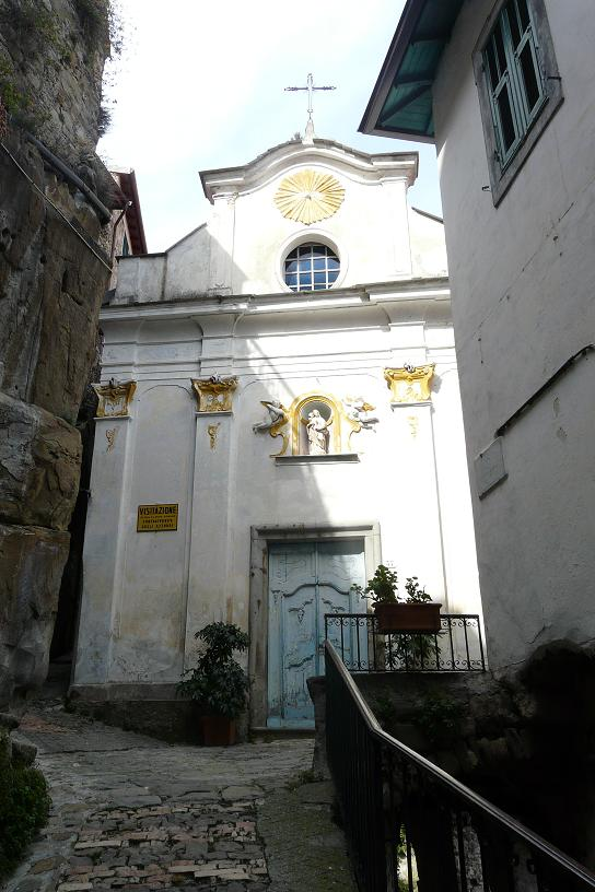 Oratorio della Visitazione, Ceriana, Liguria, Italia